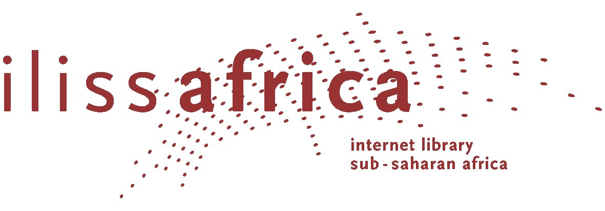 Logo der Virtuellen Fachbibliothek ilissAfrica